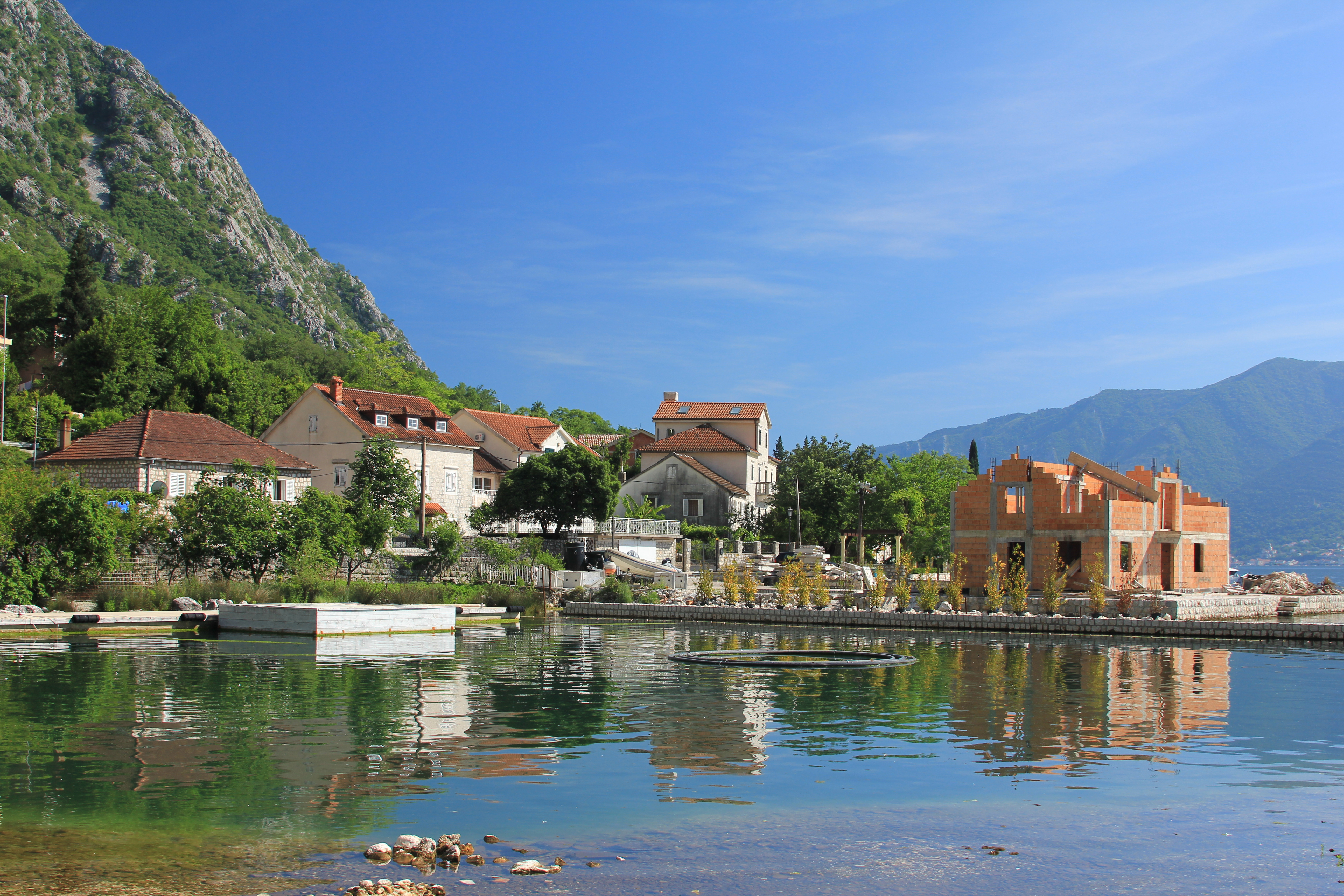 Orahovac